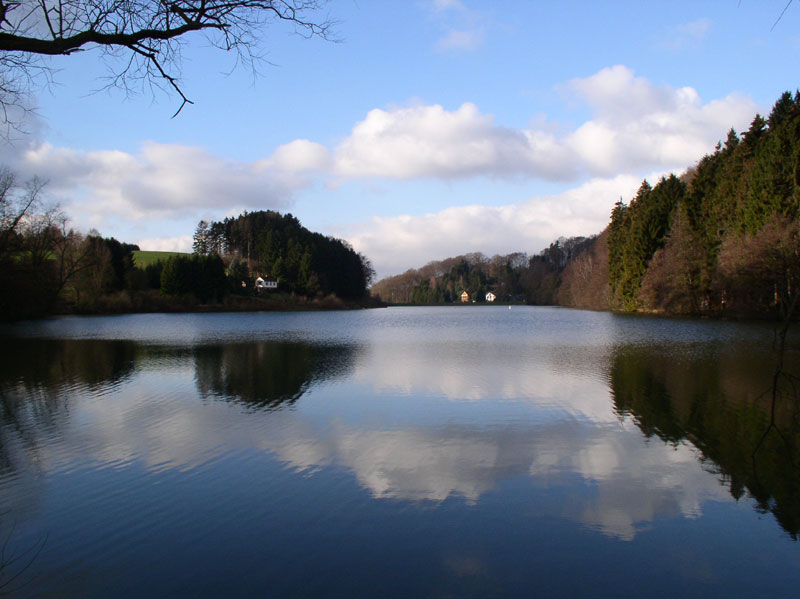 Talsperre Diepental, Unterer Stausee, 2004